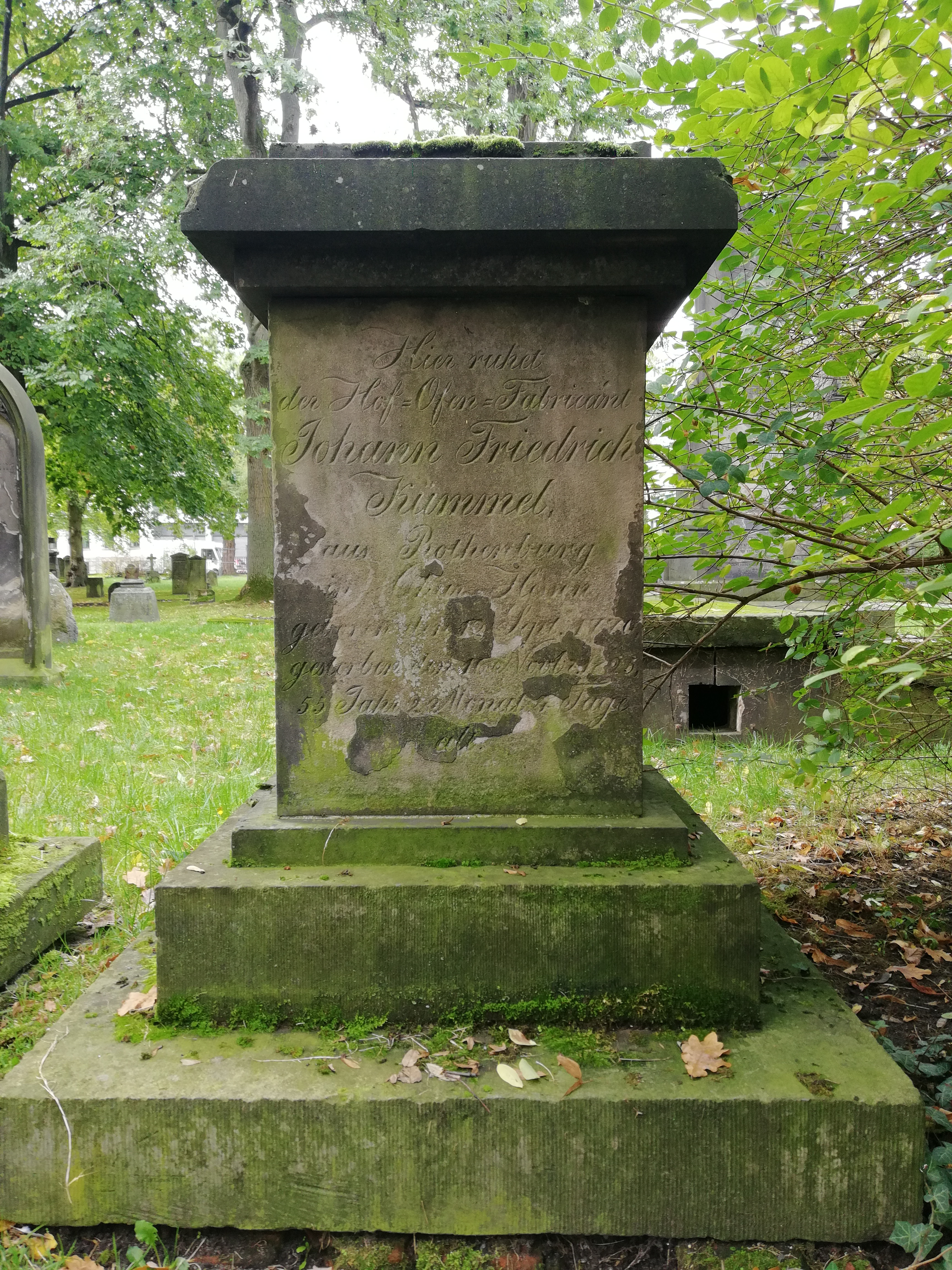 Grabmal mit der Inschrift nach Hesse: „Hier ruhet der Hof-Ofen Fabricant Johann Friedrich Kümmel aus Rothenburg in Ober Hessen geboren den 12.Sept. 1770 gestorben den 16. Novbr. 1825 55 Jahre 2 Mon.4 Tage alt. Ruhe sanft! Dem unvergeßlichen Andenken des Verewigten gewidmet von seiner tief trauernden Gattin und seinen drey, noch lebenden Kindern.“ ...